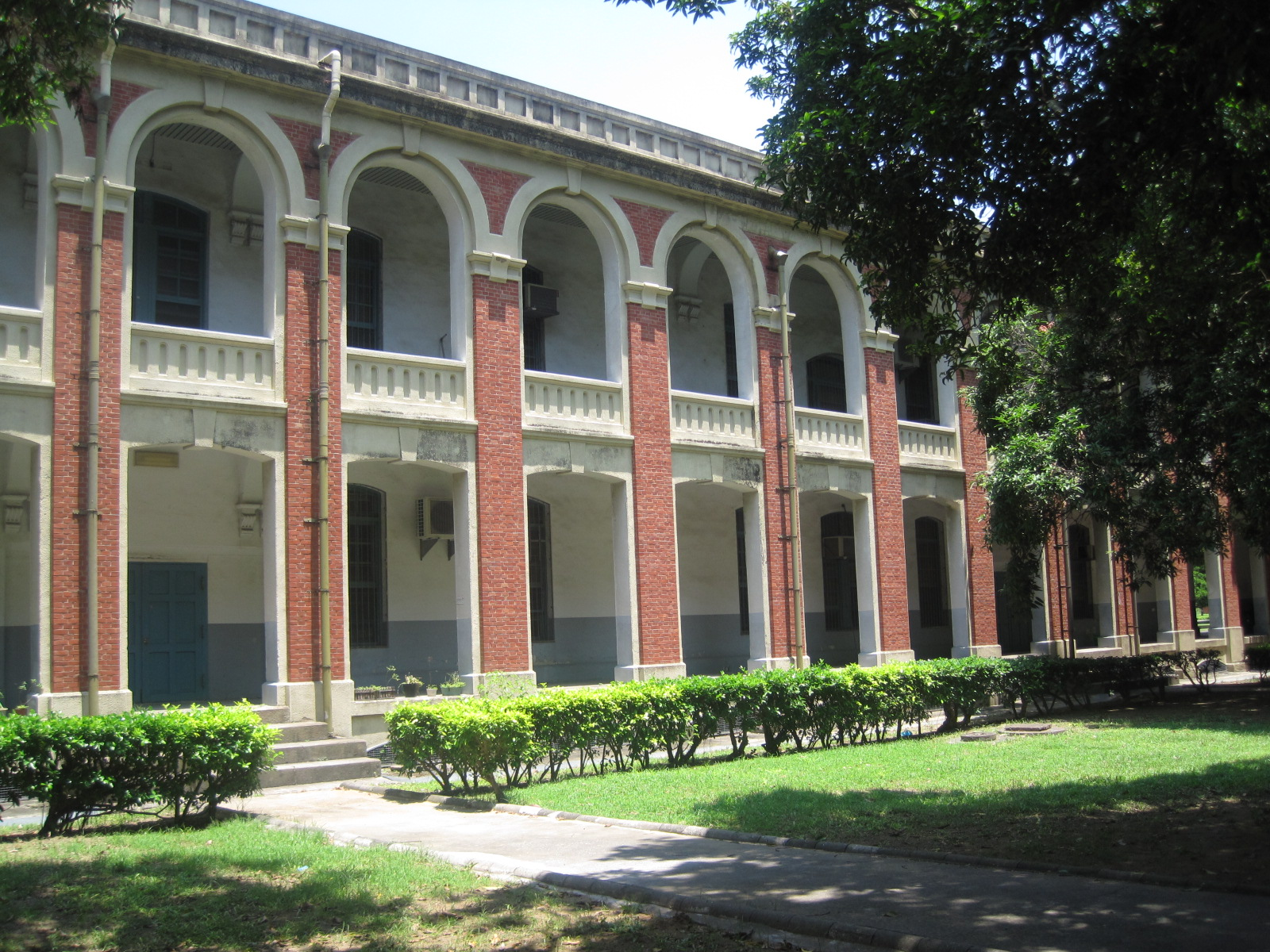 成功大學禮賢樓南面